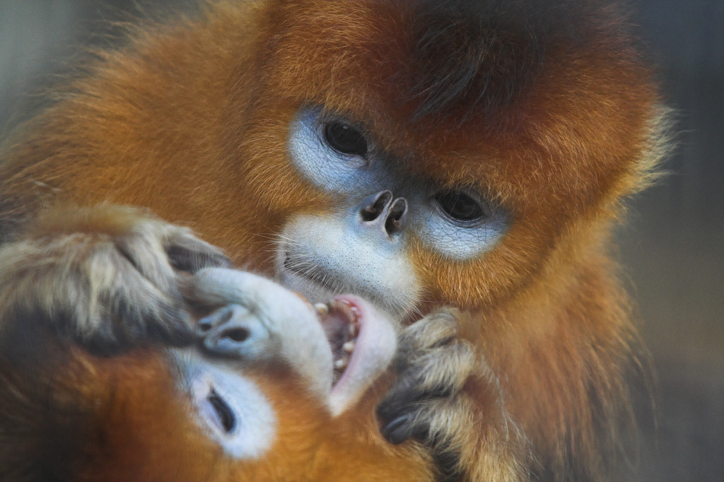 Excessive love